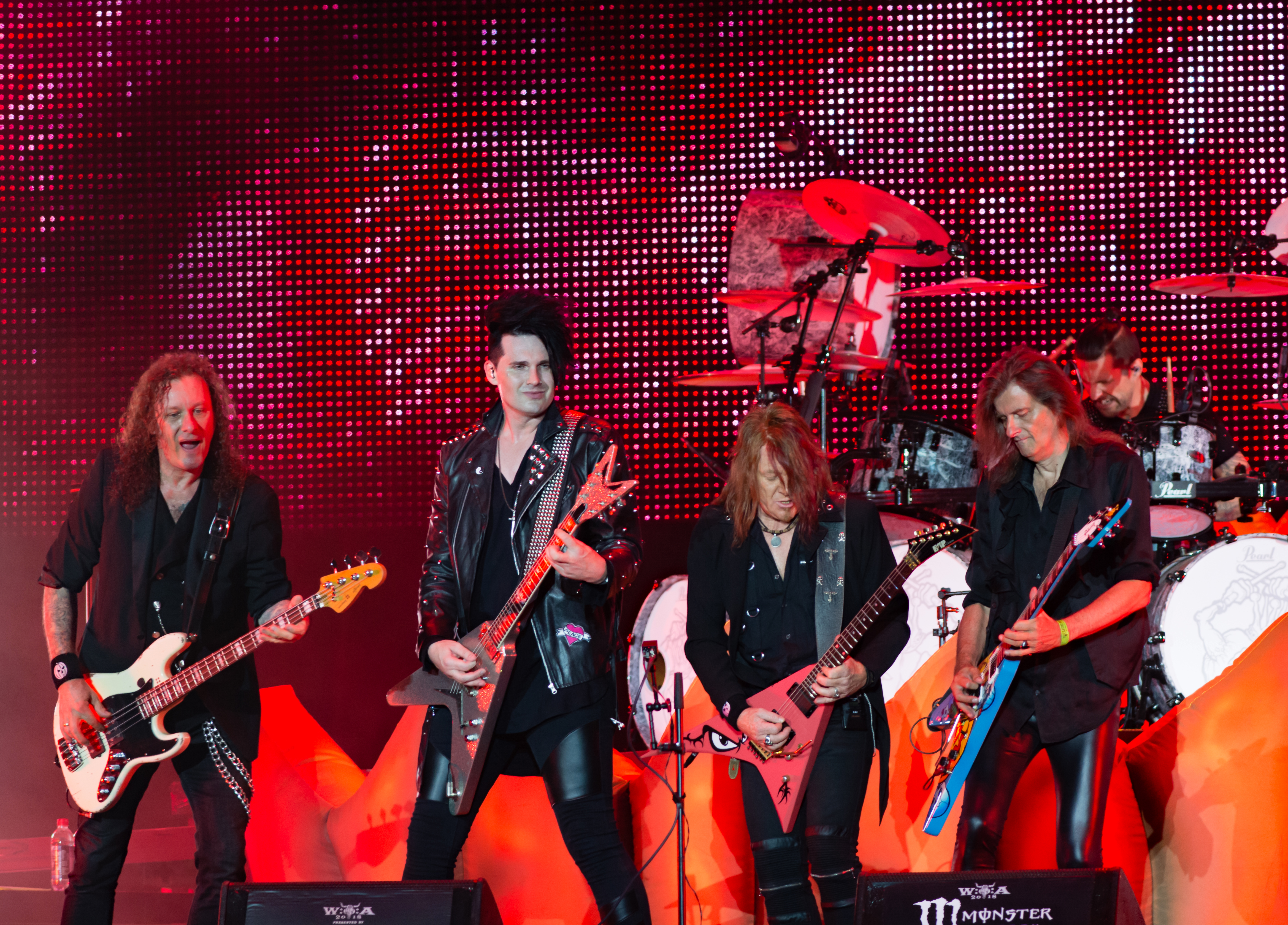 Helloween - Pumpkins United beim Wacken Open Air 2018